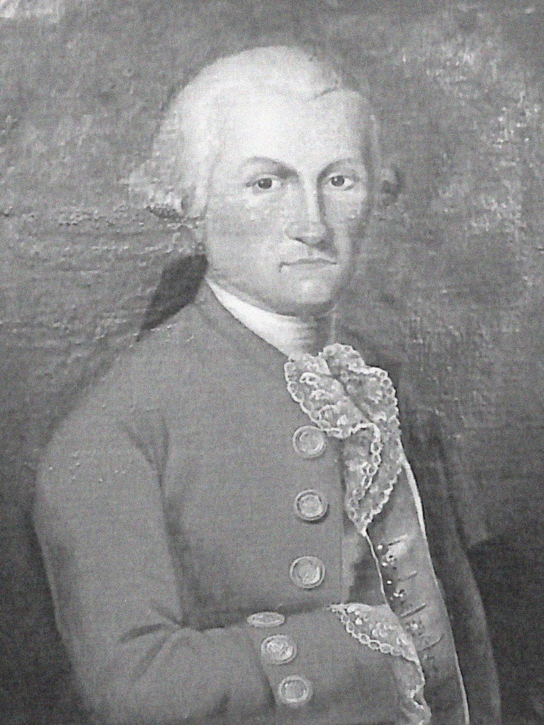 Portrait de Claude Blanchet (1737-1800), fondateur de la papeterie Blanchet de Rives (Isère)